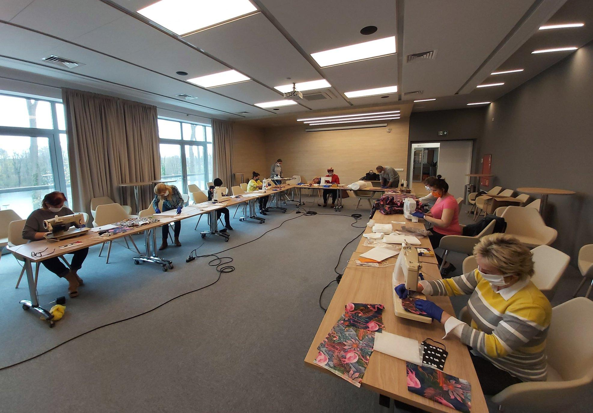 Mieszkanki gminy szyją maseczki w sali Gminnego Centrum Kultury w Kłodawie